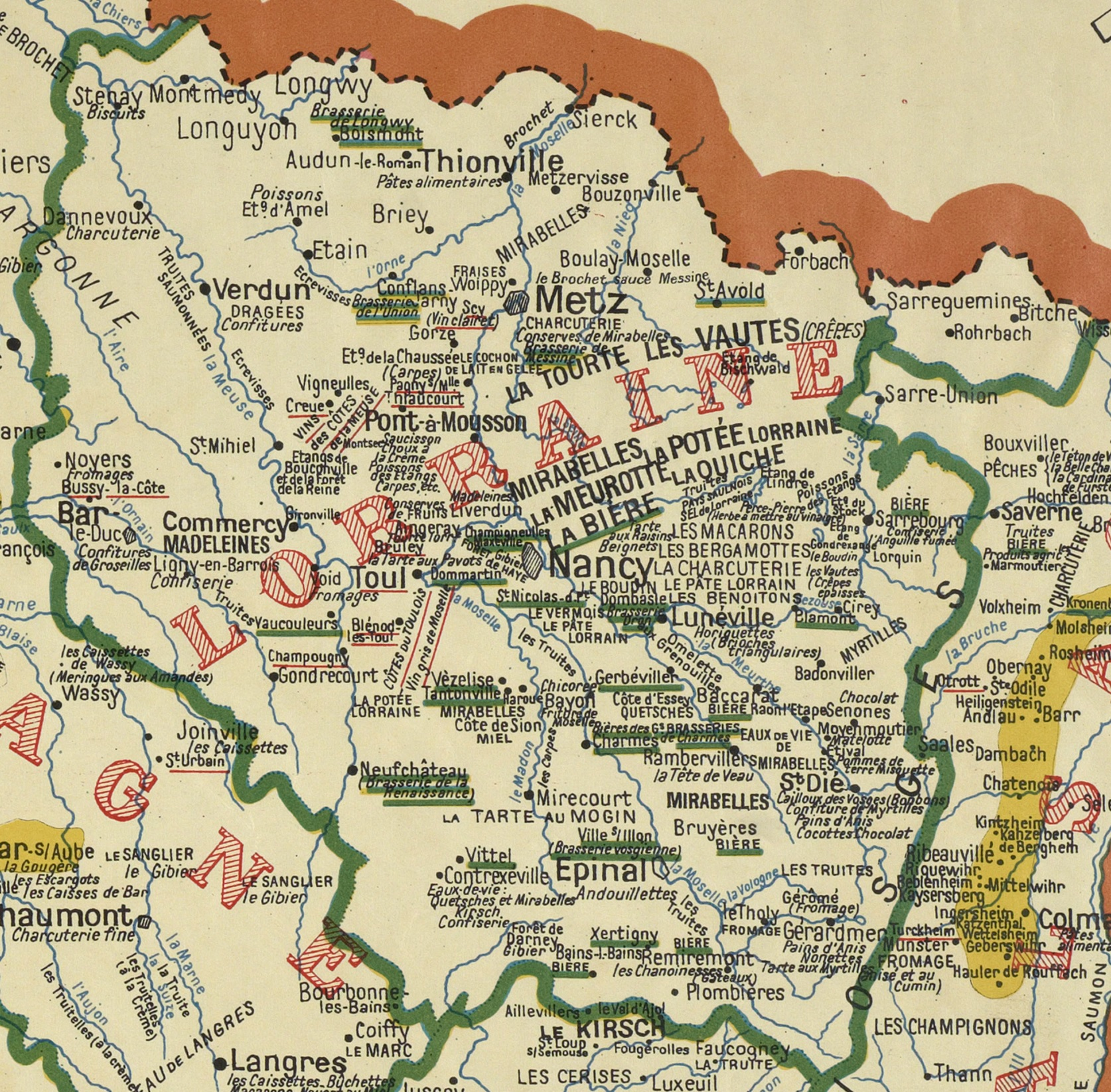 Carte gastronomique de la France / par A. Bourguignon. Éditeur : E. Girard (Paris)